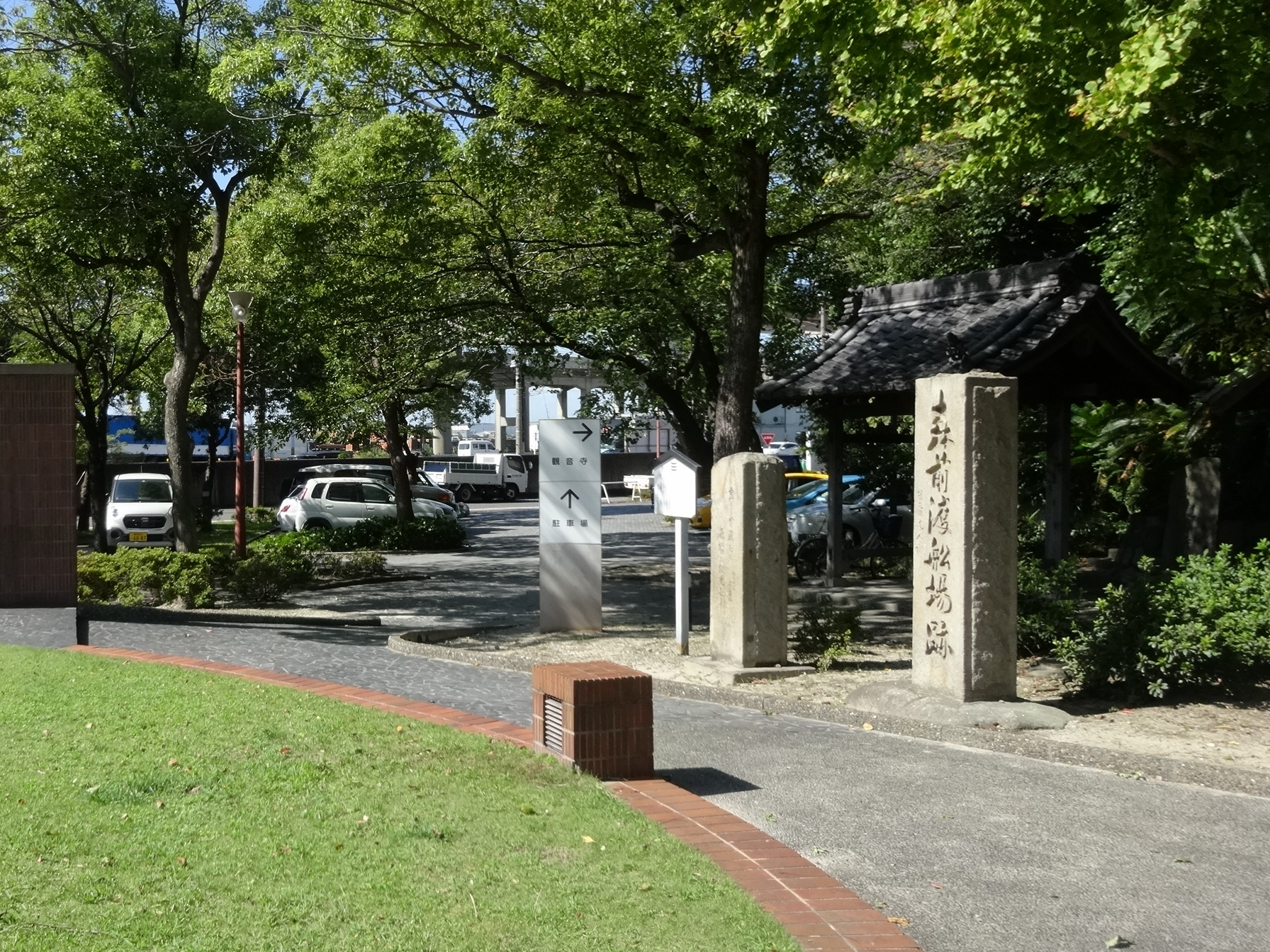 高浜市青木町にある森前の渡しがあったことを示す石碑。ここから衣浦対岸の亀崎への渡し船がここから出ていた。渡船は衣浦大橋が開通した昭和31年（1956）に廃止され、現在ではそれを示す石碑が残る。